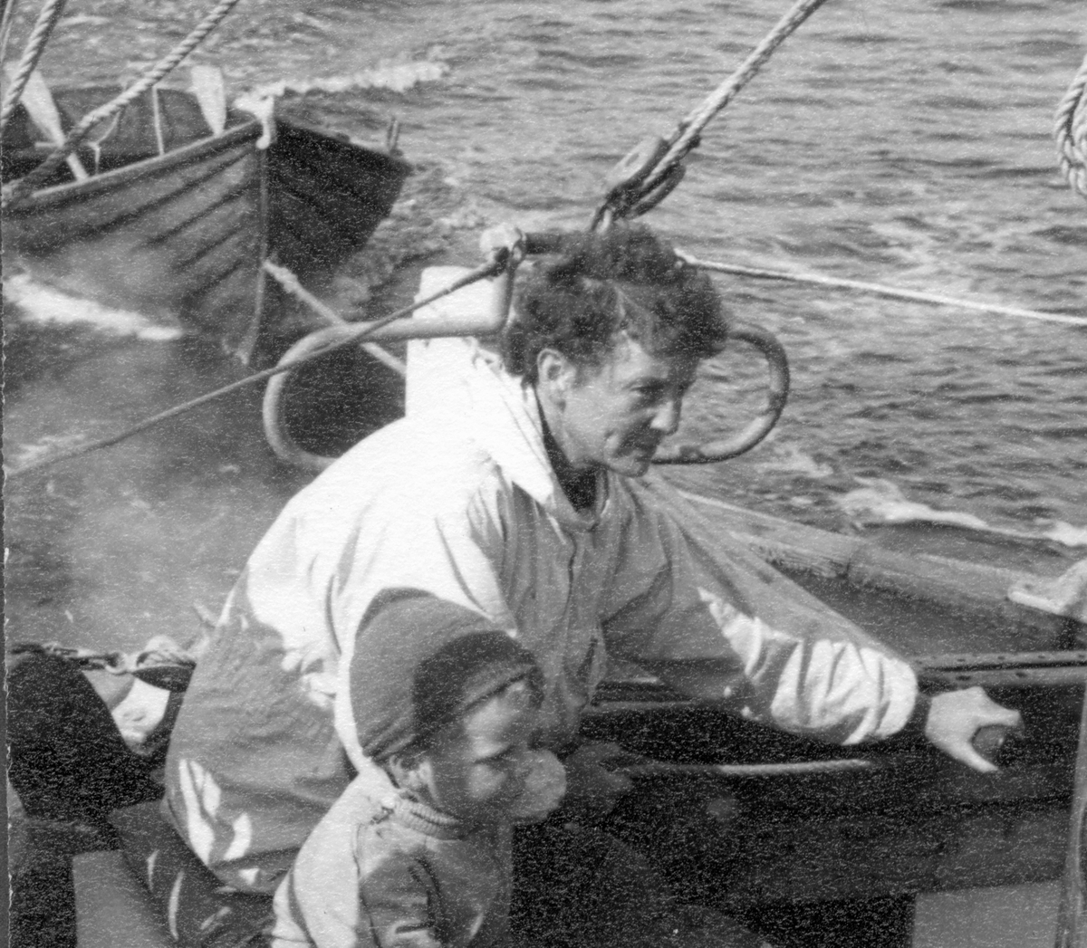 "Stavangers" Lofotjolle - Lillerut til rors med sønnen Jeppe Jul Nielsen ved siden.